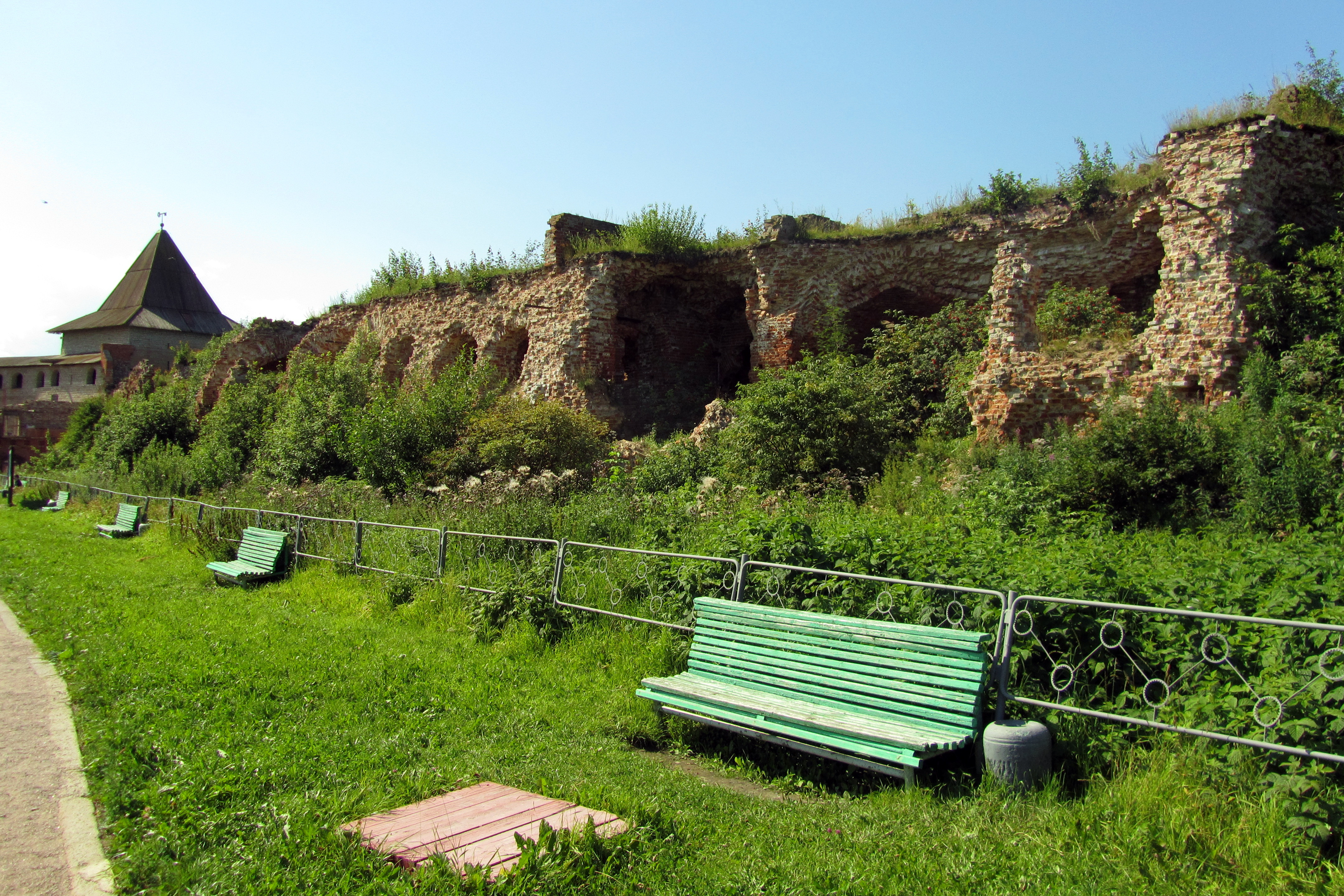 Казарма солдатская «Нумерная» («Зверинец») (Санкт-Петербург и Лен.область, Шлиссельбург, о. Ореховый, в истоке р. Нева)